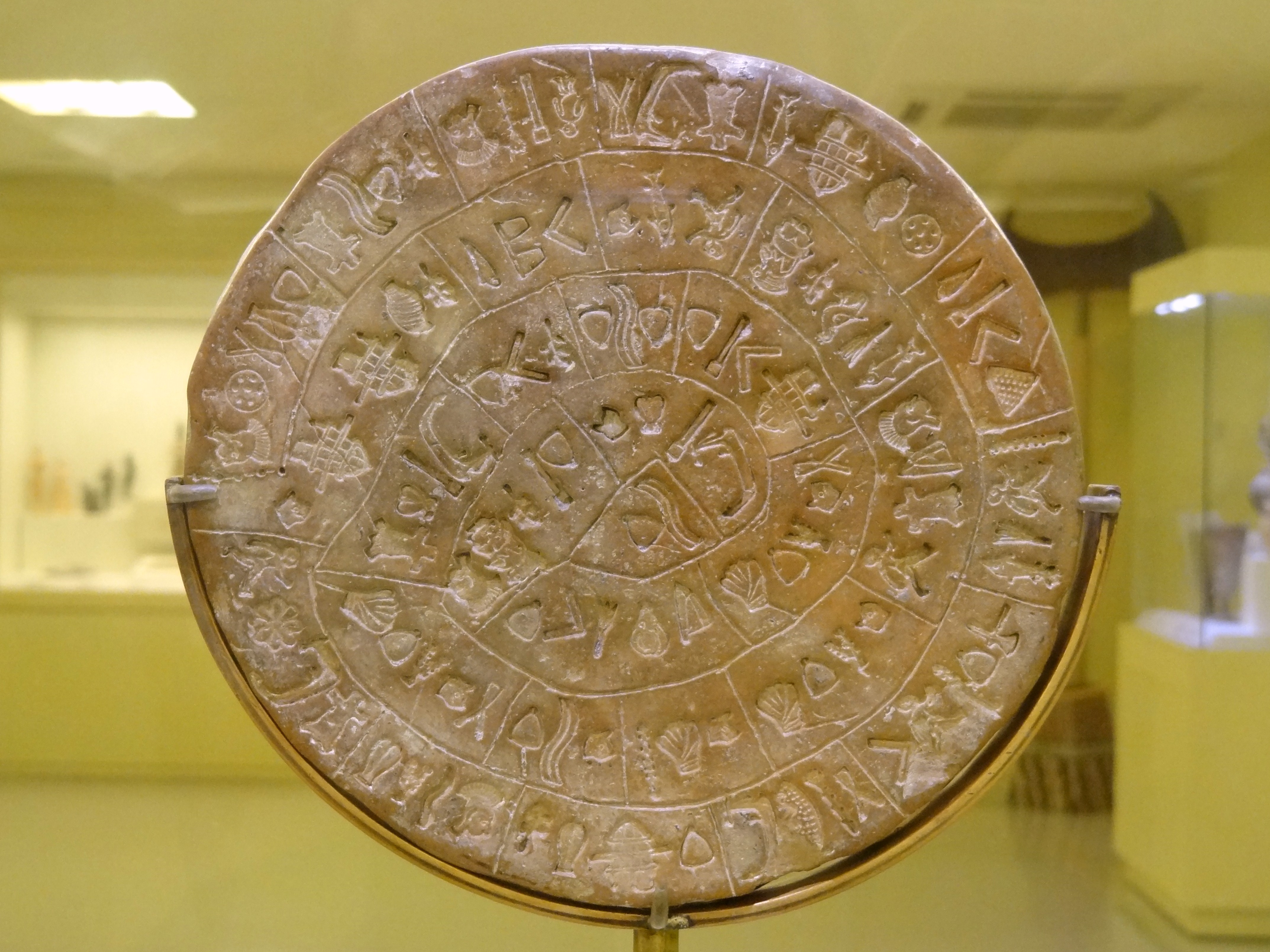 Der am 3. Juli 1908 in der Ausgrabungsstätte von Phaistos gefundene Diskos von Phaistos (Seite B), ausgestellt im Archäologischen Museum Iraklio, Kreta, Griechenland